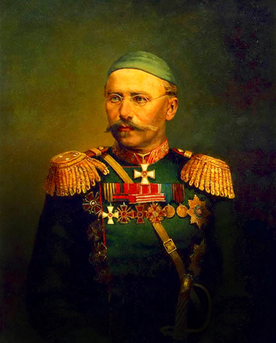 Тюрин Иван Алексеевич - Портрет генерала Александра Константиновича Абрамова